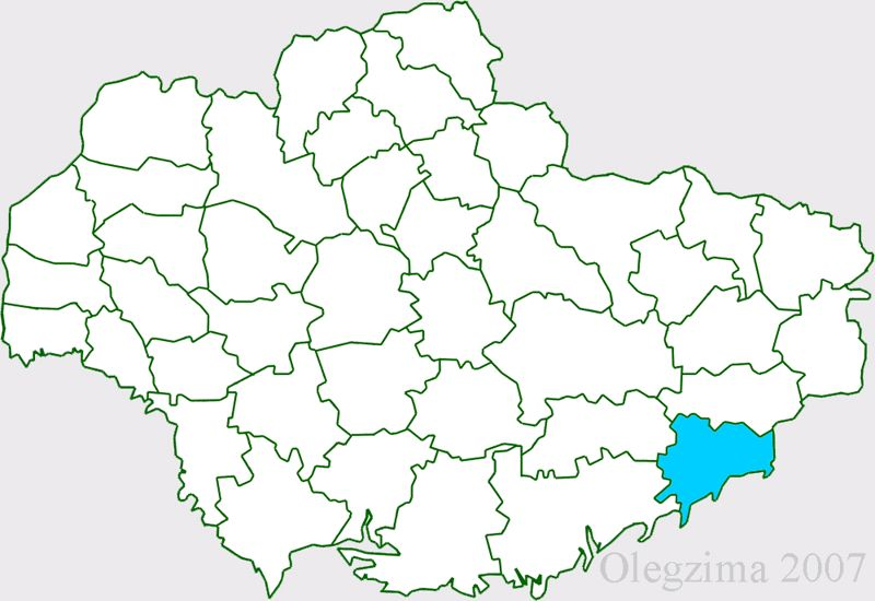 Mariupol old map map